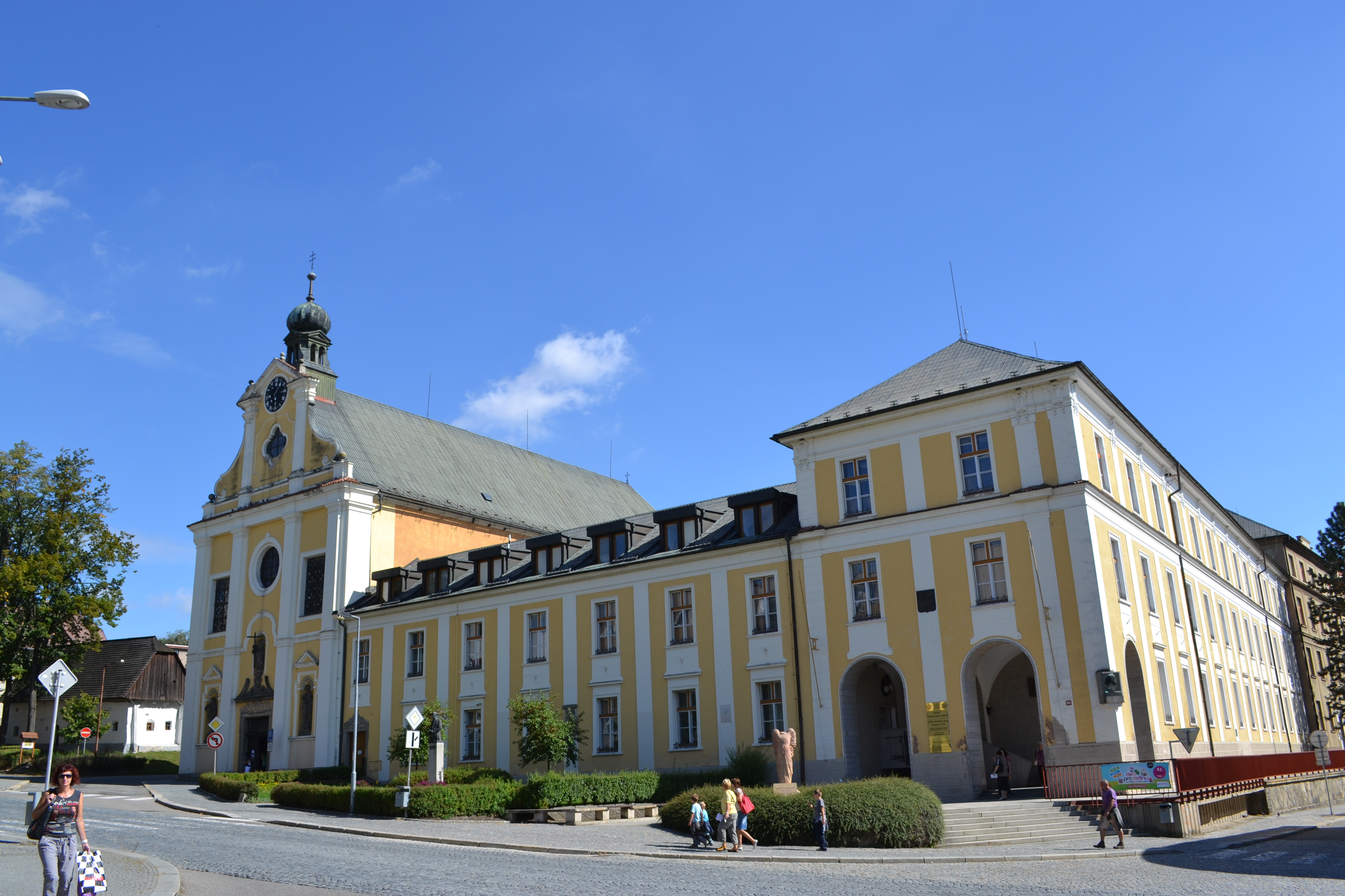 Klášter - s kostelem sv. Rodiny a kaplí Božího hrobu (Havlíčkův Brod), Dobrovského, Štáflova 2003, Havlíčkův Brod